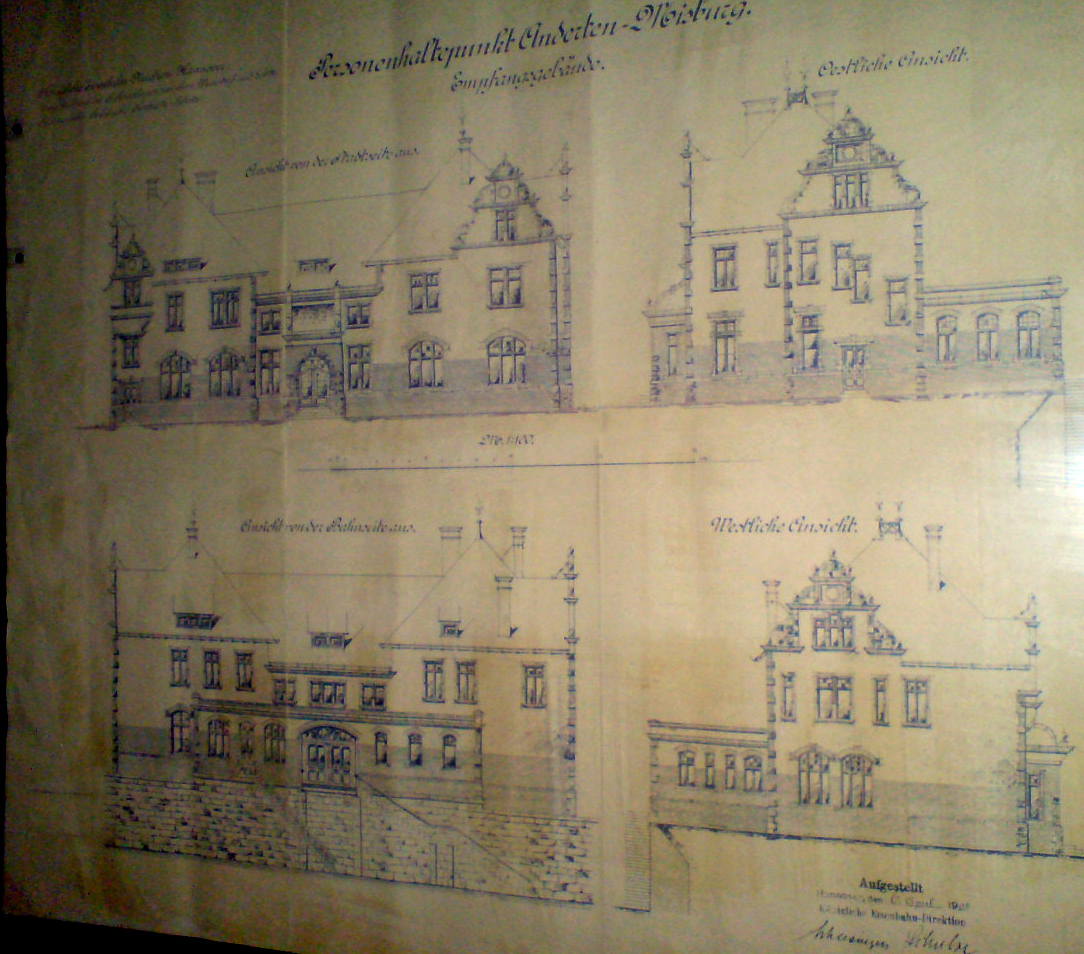 Eindrücke vom denkmalgeschützten Alten Bahnhof Anderten in Hannover ...